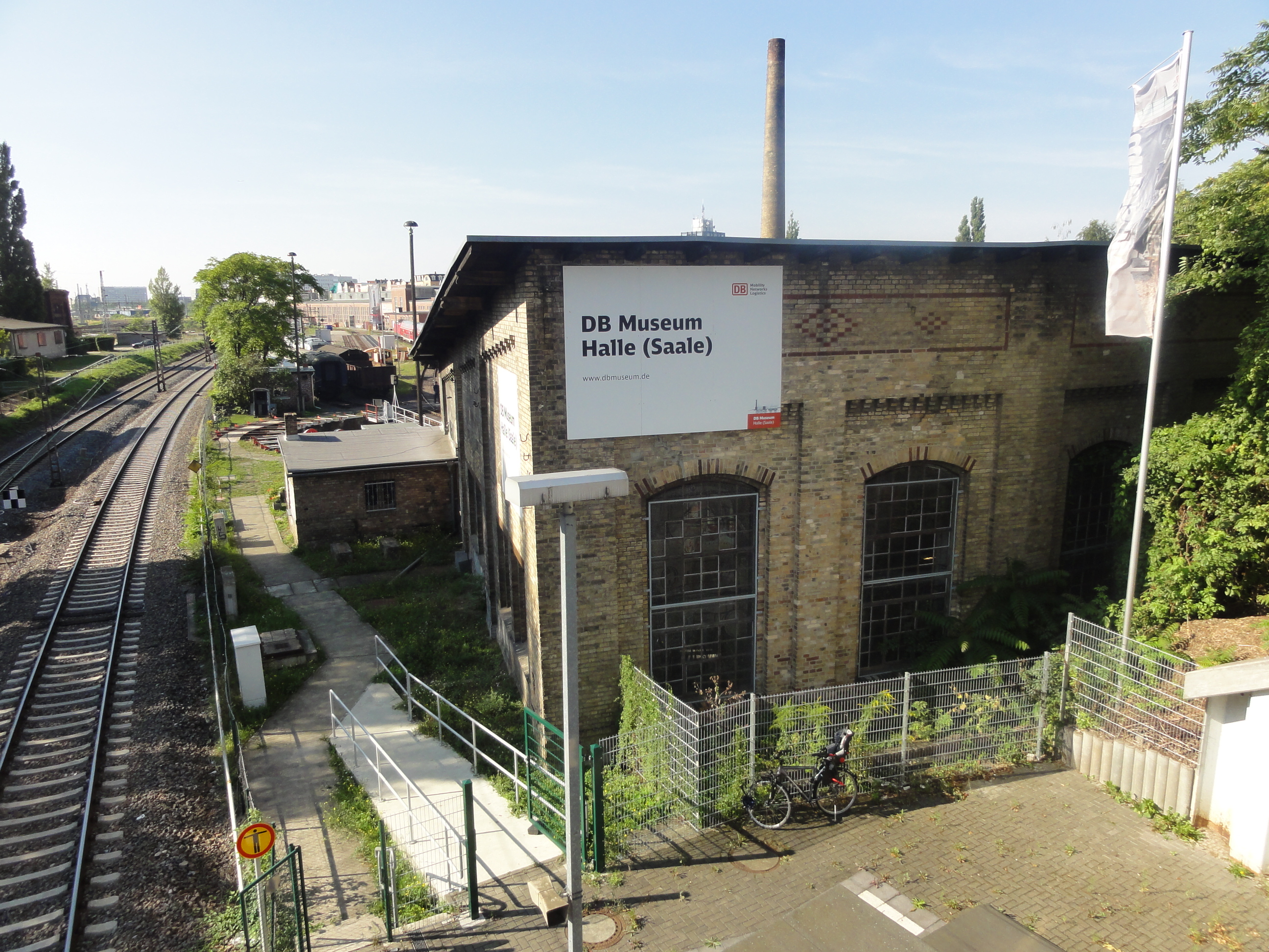 DB Museum Halle (Saale)